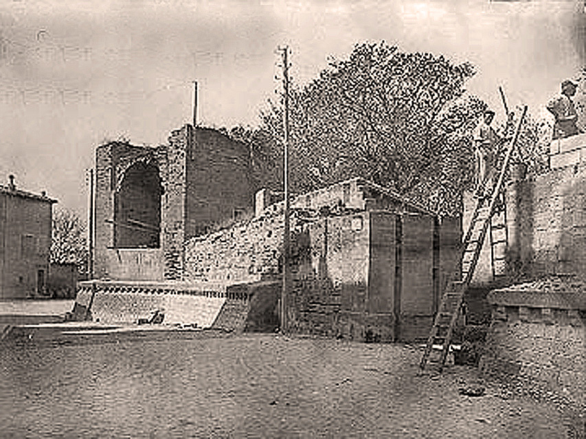 Aménagement de la brèche Saint-Dominique au début du XXe s